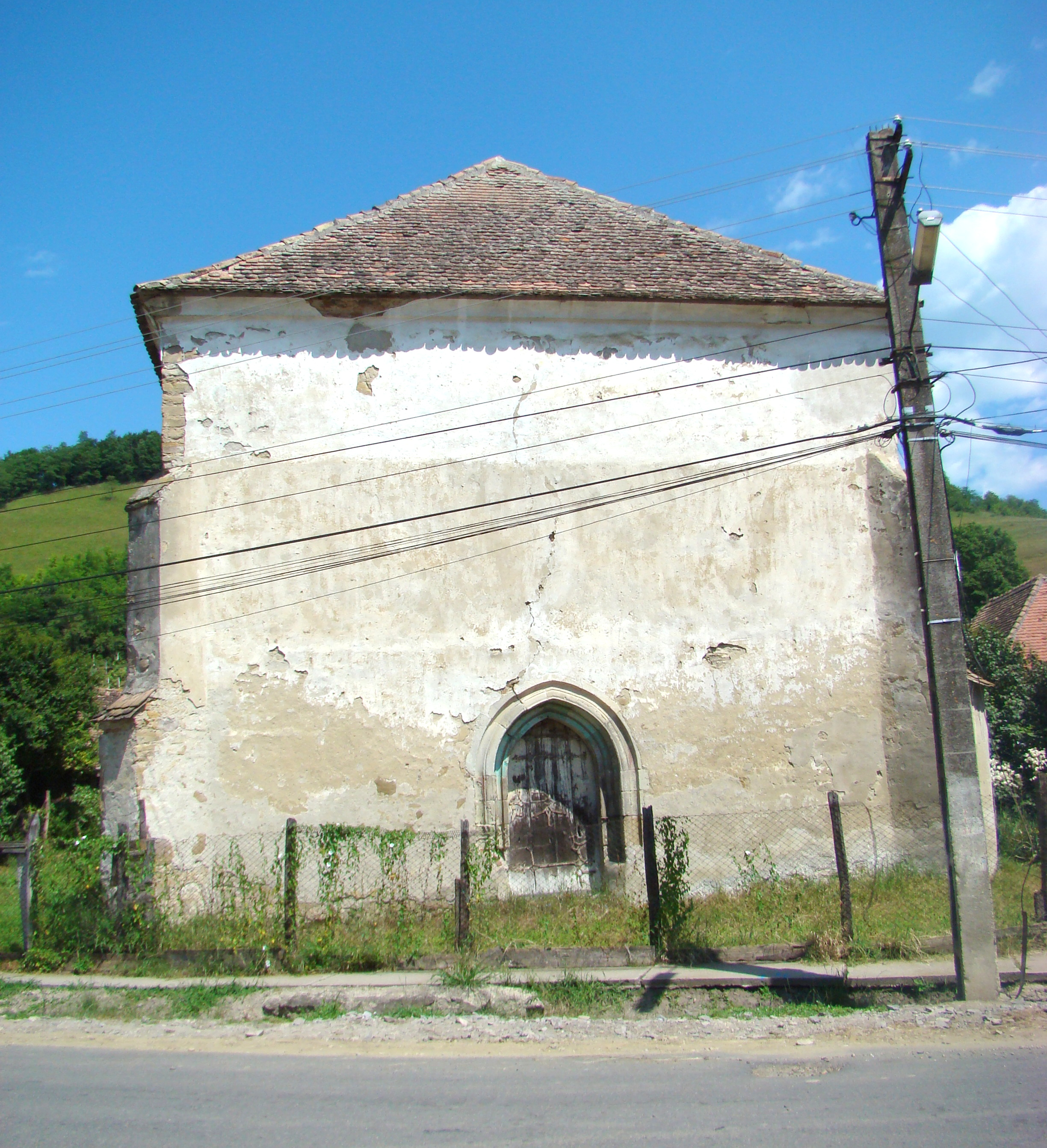 Biserica evanghelică, sat Șmig; comuna Alma